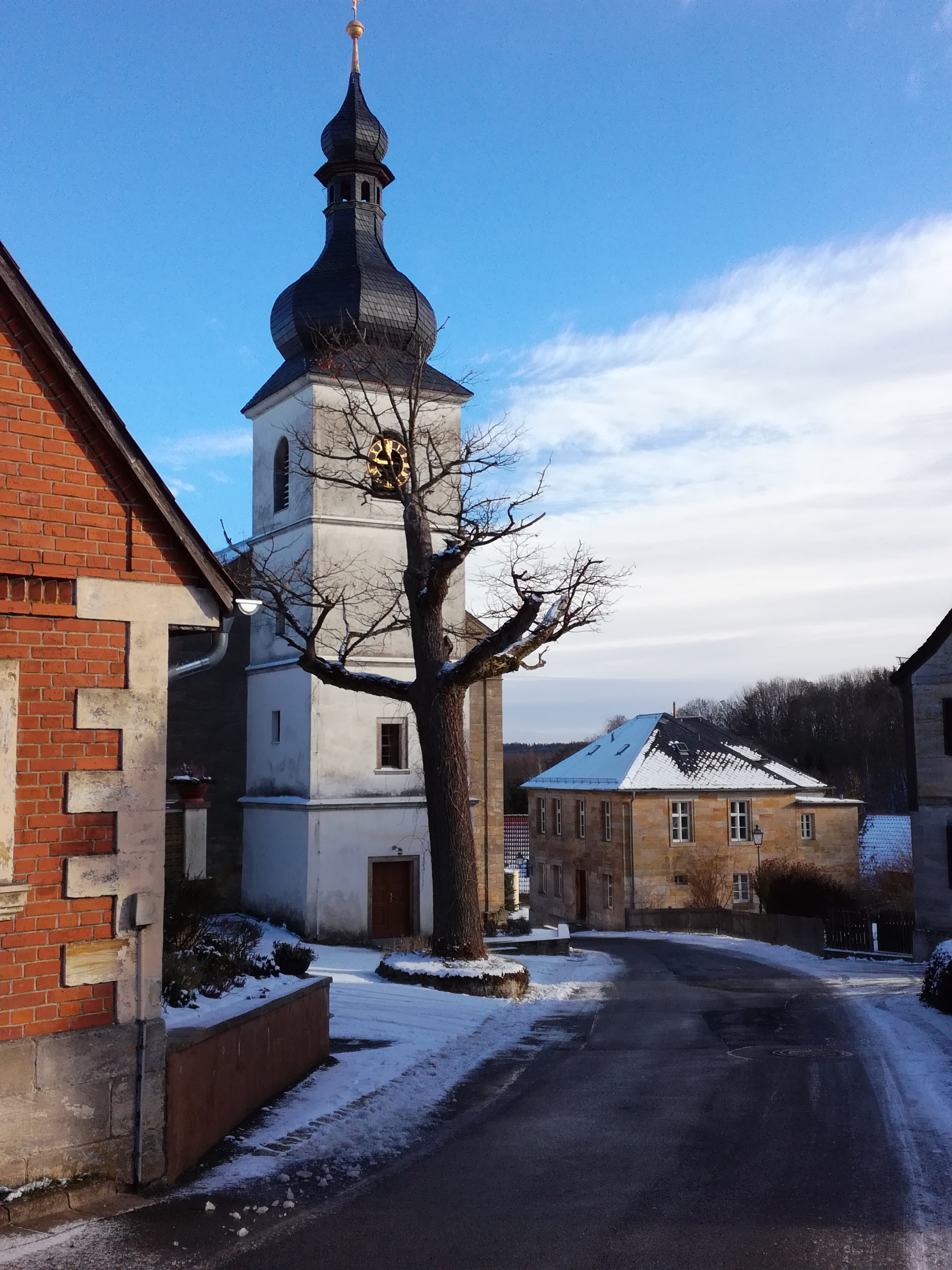 Kirche in Haag (Oberfranken)